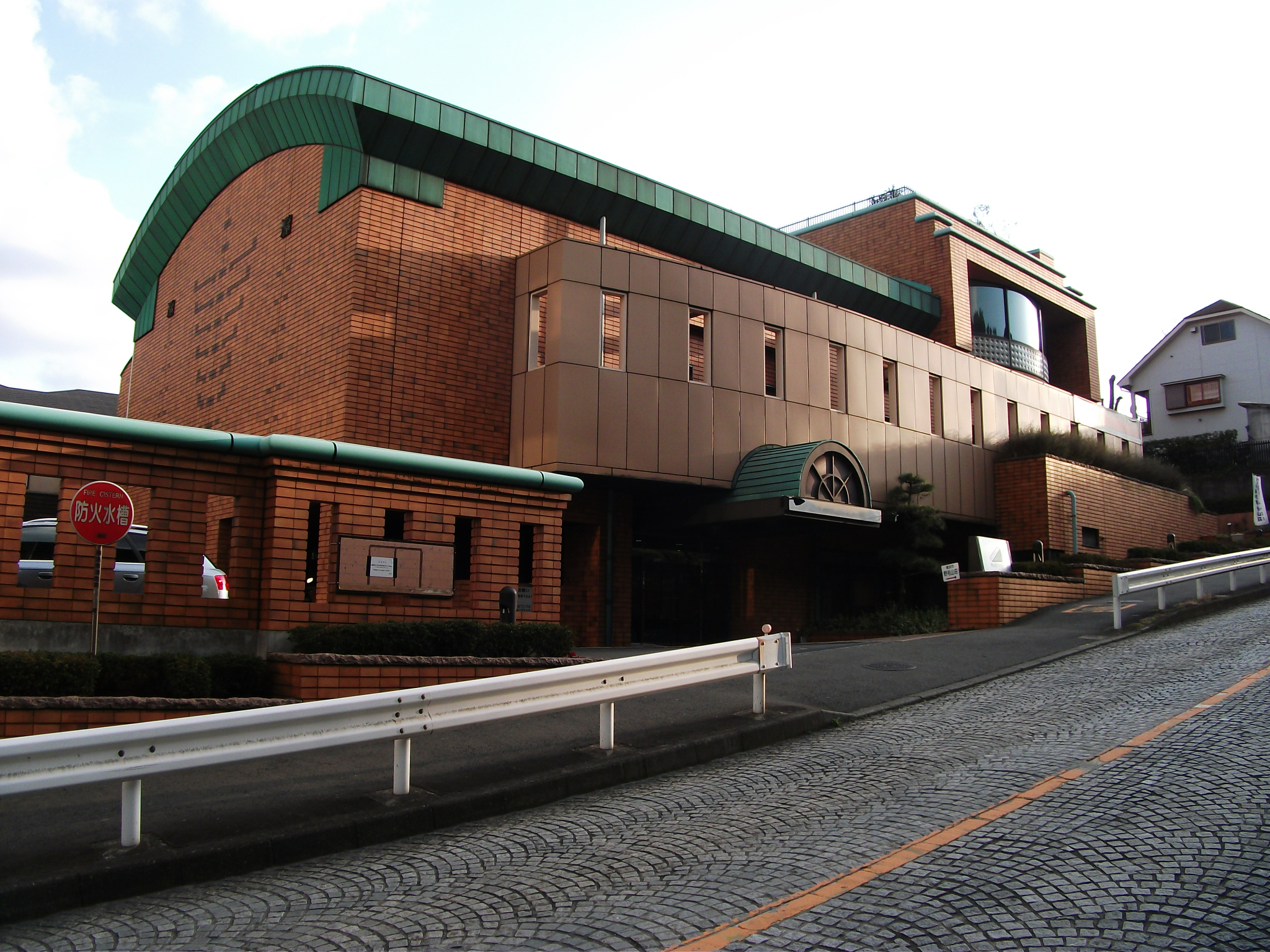 横浜市中区老松町、急な坂スタジオ